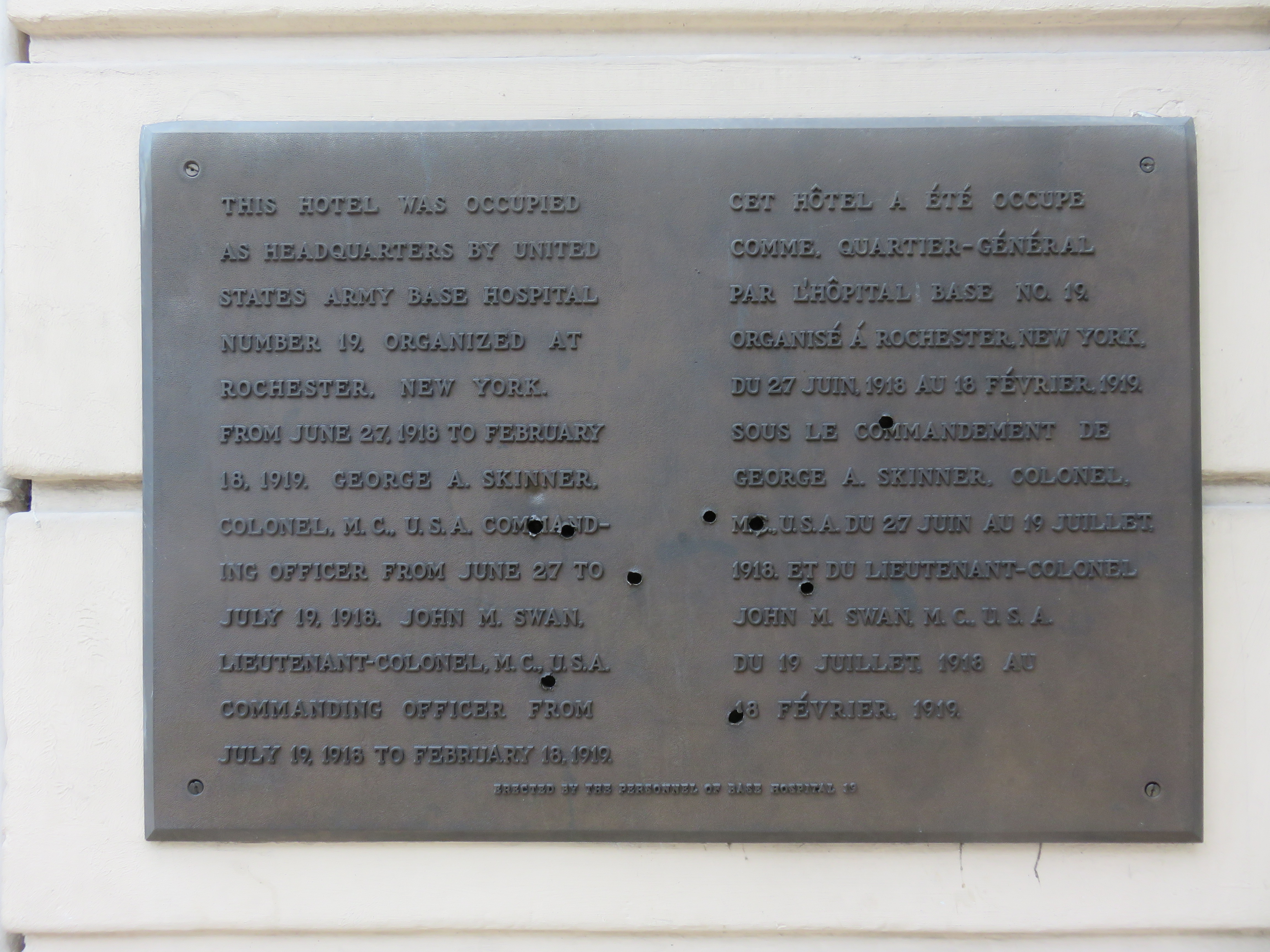 Plaque à l'entrée de l'Hôtel International, rue du Maréchal Foch à Vichy (Allier, France).